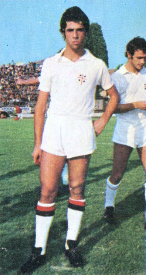 Il calciatore italiano Pietro Paolo Virdis al Cagliari all'inizio della stagione 1974-75.